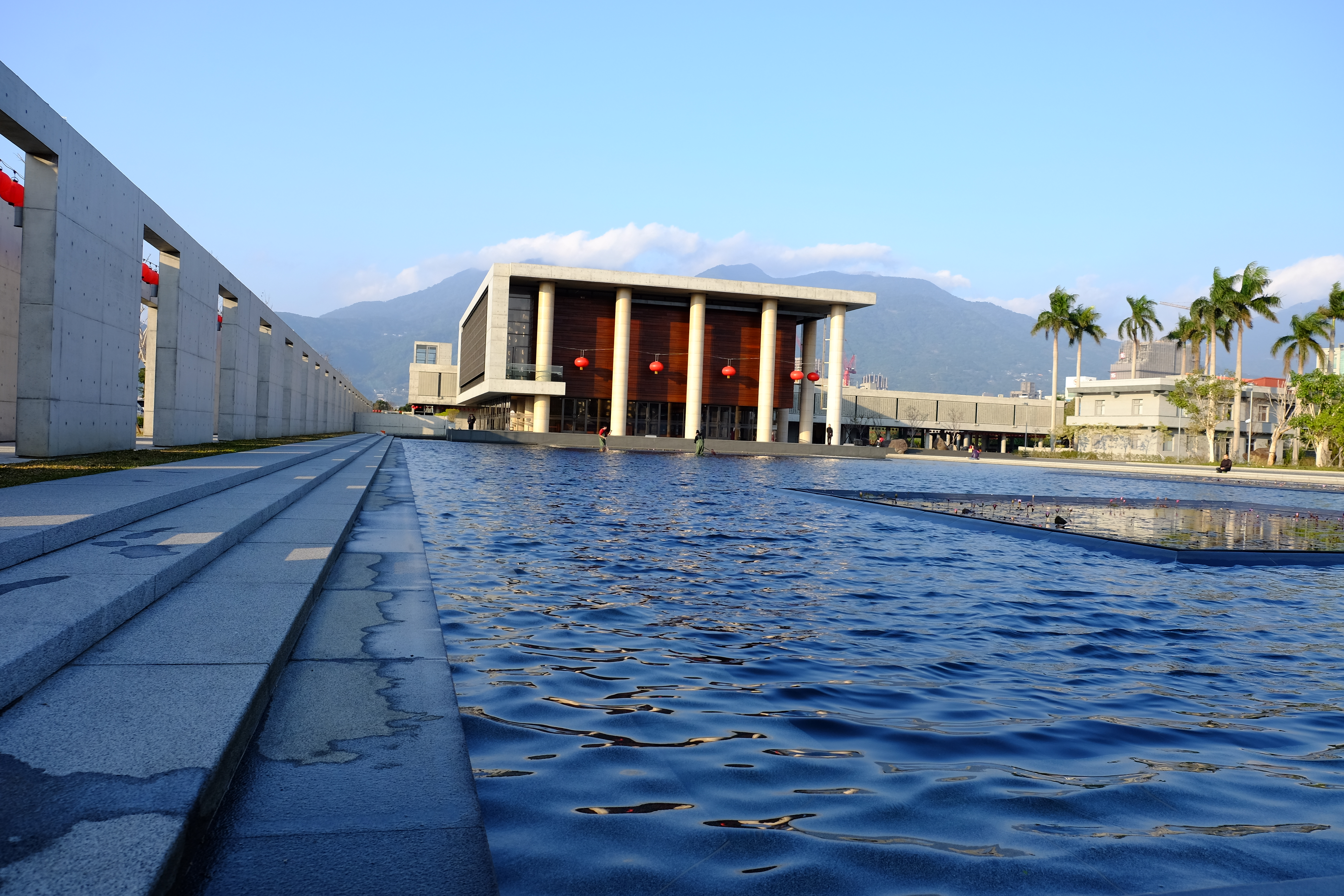 農禪寺水月道場